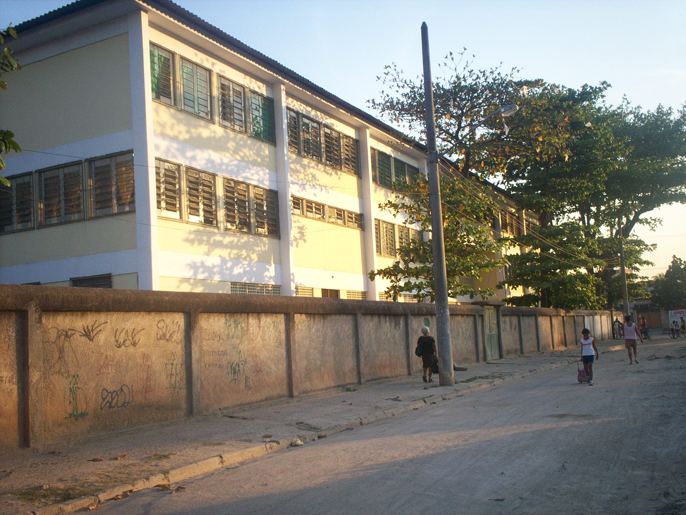 Escola Municipal Lúcio de Mendonça